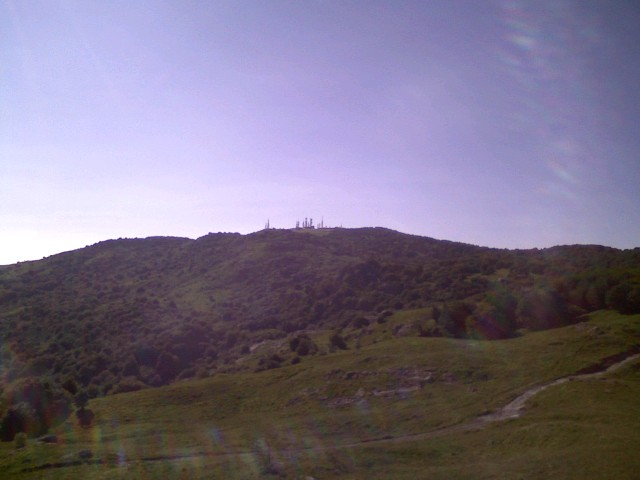 Antonello Piccone, Monte Beigua visto dal Monte Sciguello